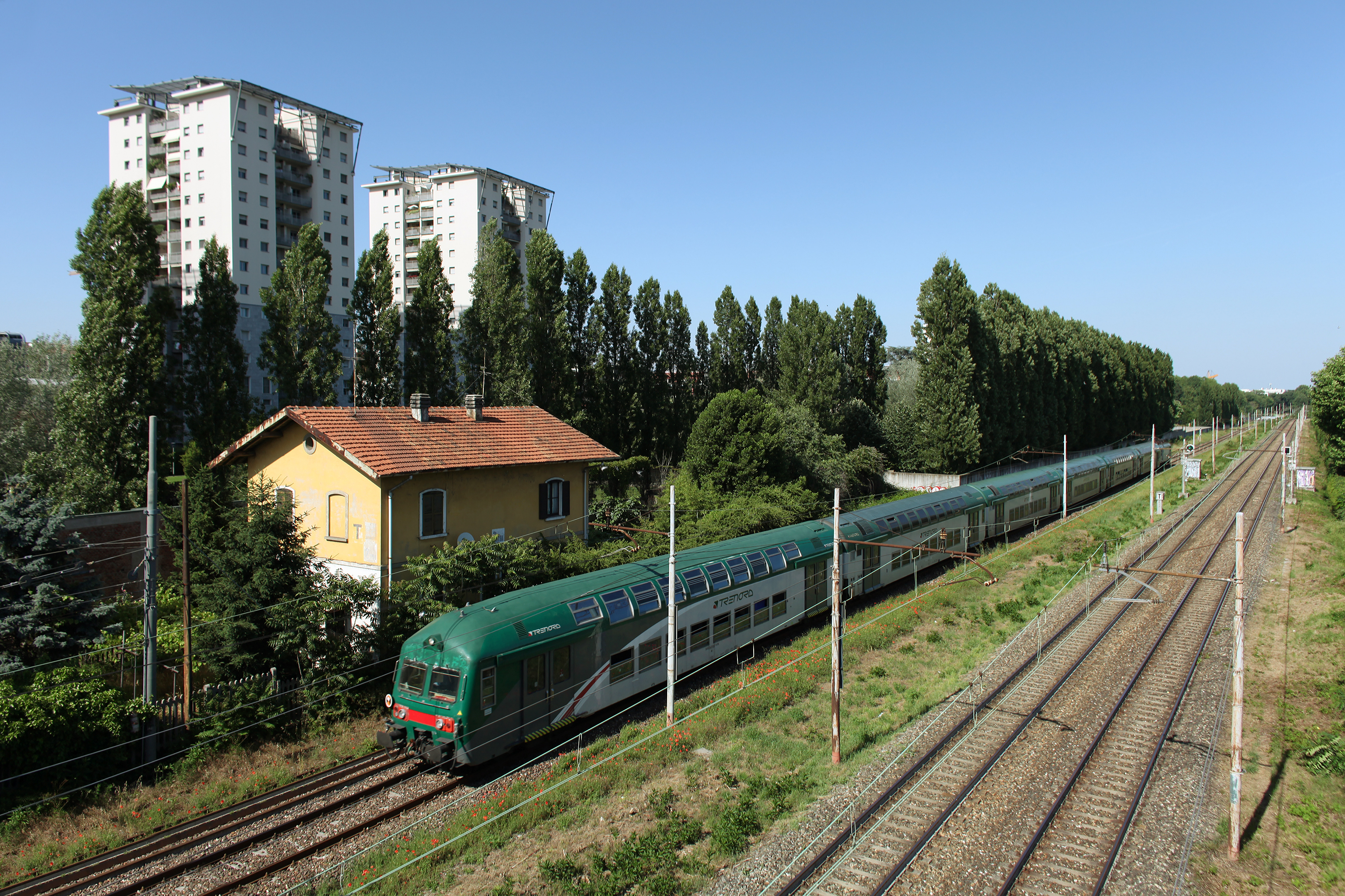 Un convoglio a due piani tipo 1979 in livrea Trenord transita sulla linea ferroviaria Milano-Mortara nei pressi del ponte di via Brunelleschi a Milano